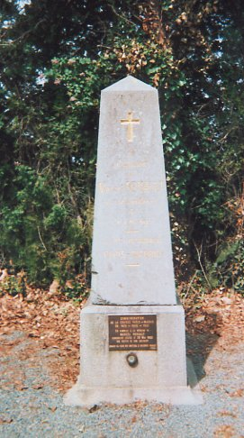 * Date : 19 juin 2004, vers 11h30 Source : photo personnelle d'archeos Description : monument Marcel Renault, sur le bord de la N10- altitude 126 m 65. Texte de la plaque : A la mémoire de Marcel Renault mort le 26/05/1903 et Commémoration de la course Paris-Madrid en 1972, 1983, 1993 par Renault SA et le club des amateurs d'anciennes Renault Licence